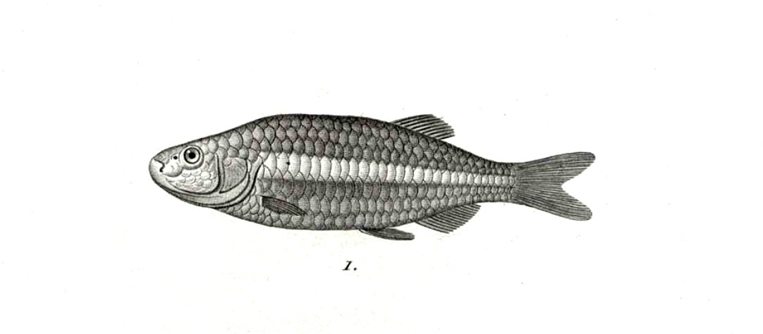 Grundulus bogotensis. Humboldt, 1821.